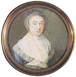 Miniatuur van Aagje Deken (1741-1804)